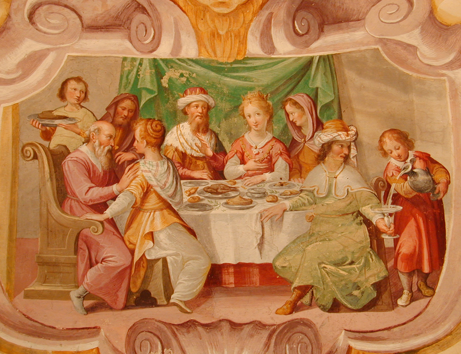 Guglielmo Caccia, detto "il Moncalvo". Sacro Monte di Crea. Affreschi